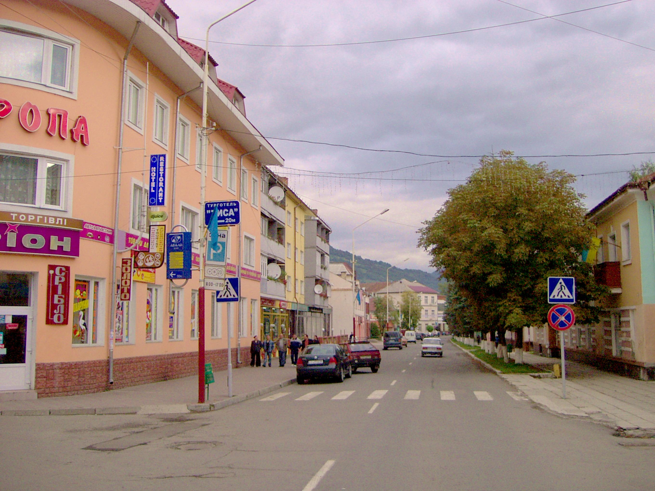 Myra-Straße in Rakhiv (Ukraine), die Hauptgeschäftsstraße des Ortes am Hotel Europa.